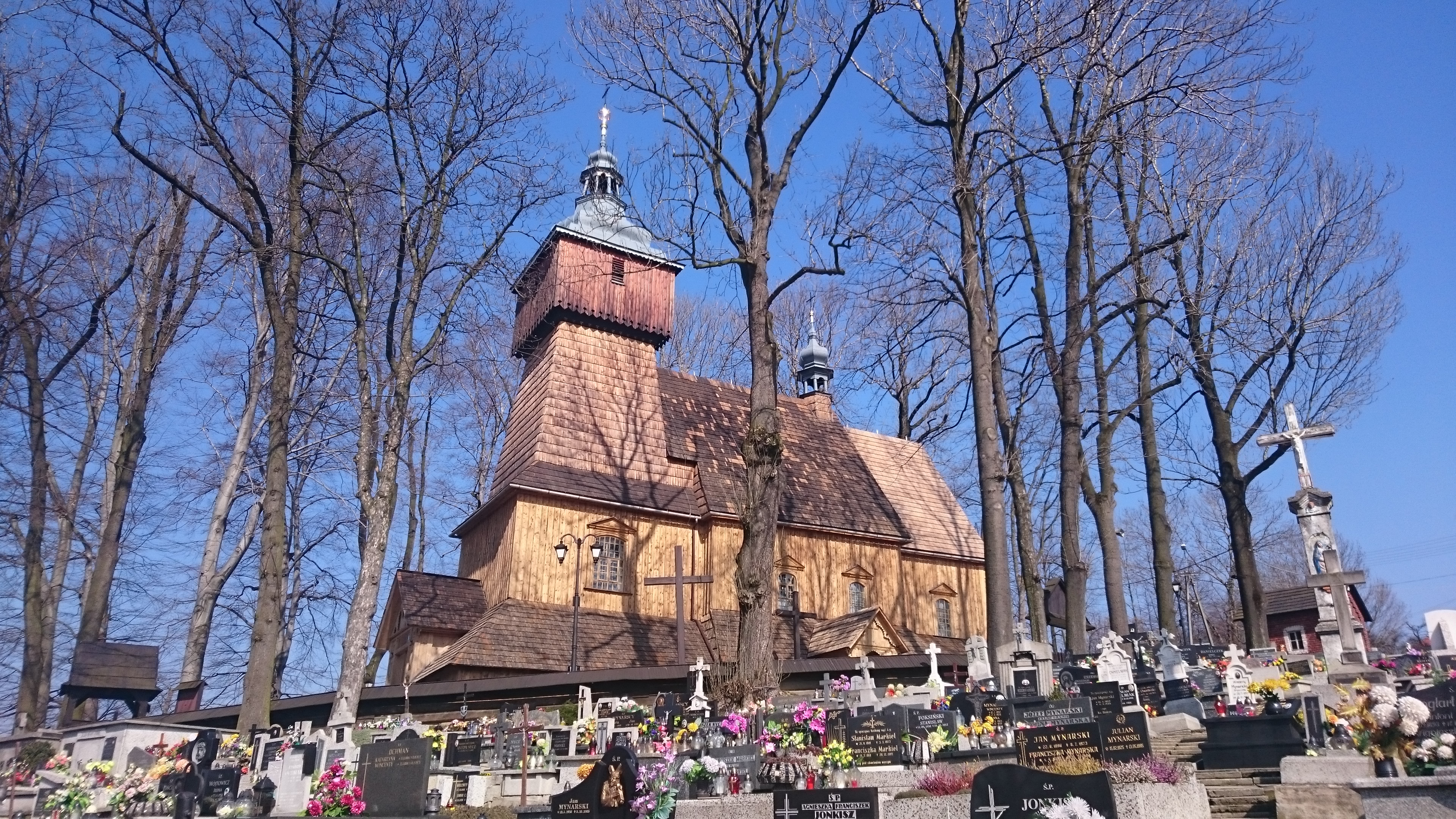 Stara Wieś, Kościół Podwyższenia Krzyża Świętego